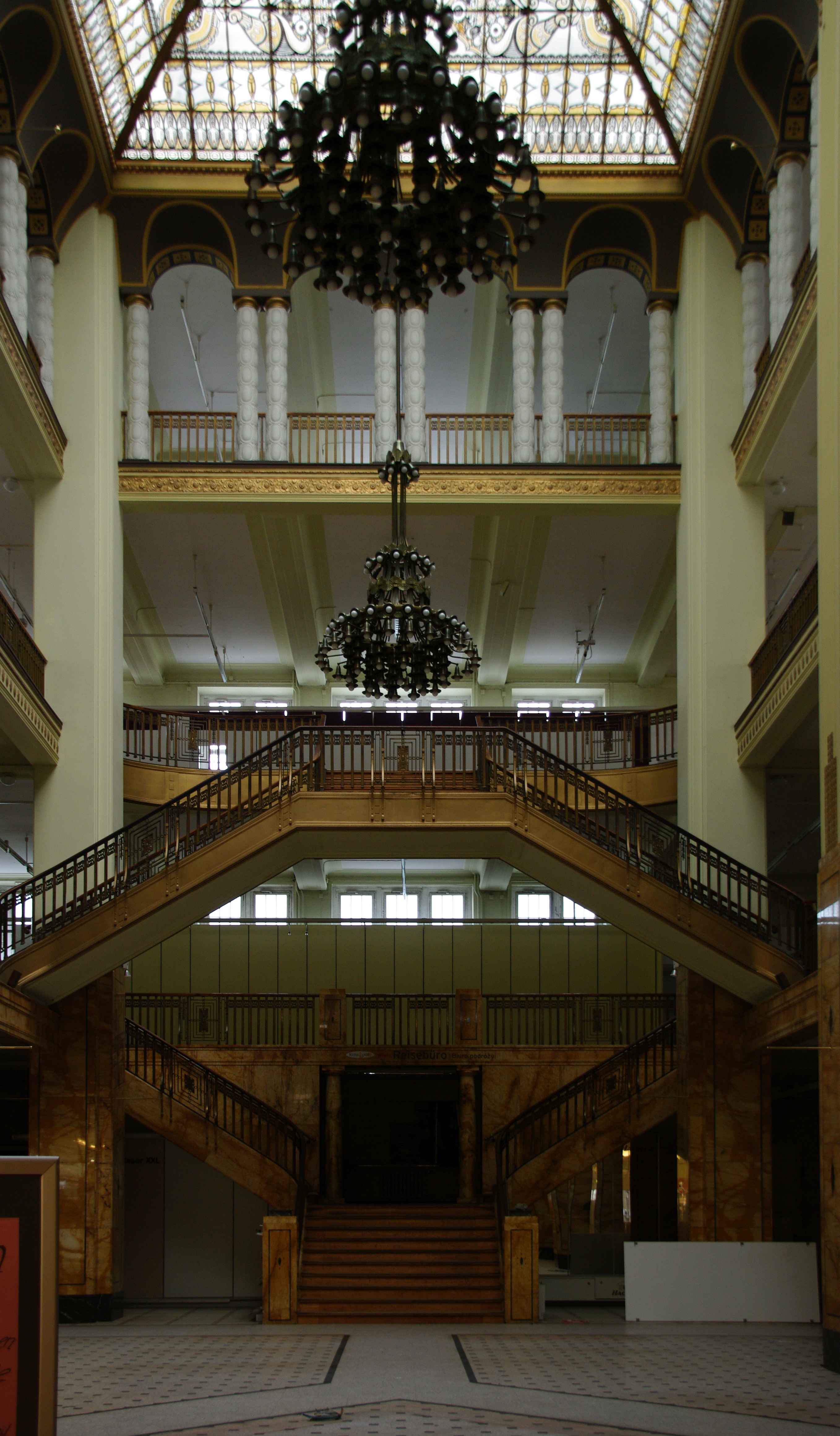 Das Görlitzer Warenhaus, bis auf eine Parfümerie im Erdgeschoss leer stehend, im Mai 2011.